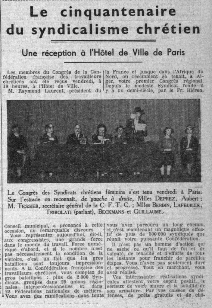 Photo 1ère page du journal La Croix, Photo Madeleine Tribolati parlant à la Tribune. 27 juin 1937.